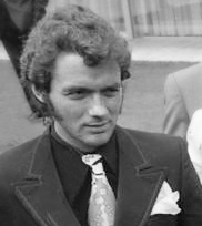 Hans-Jürgen Bäumler in 1971